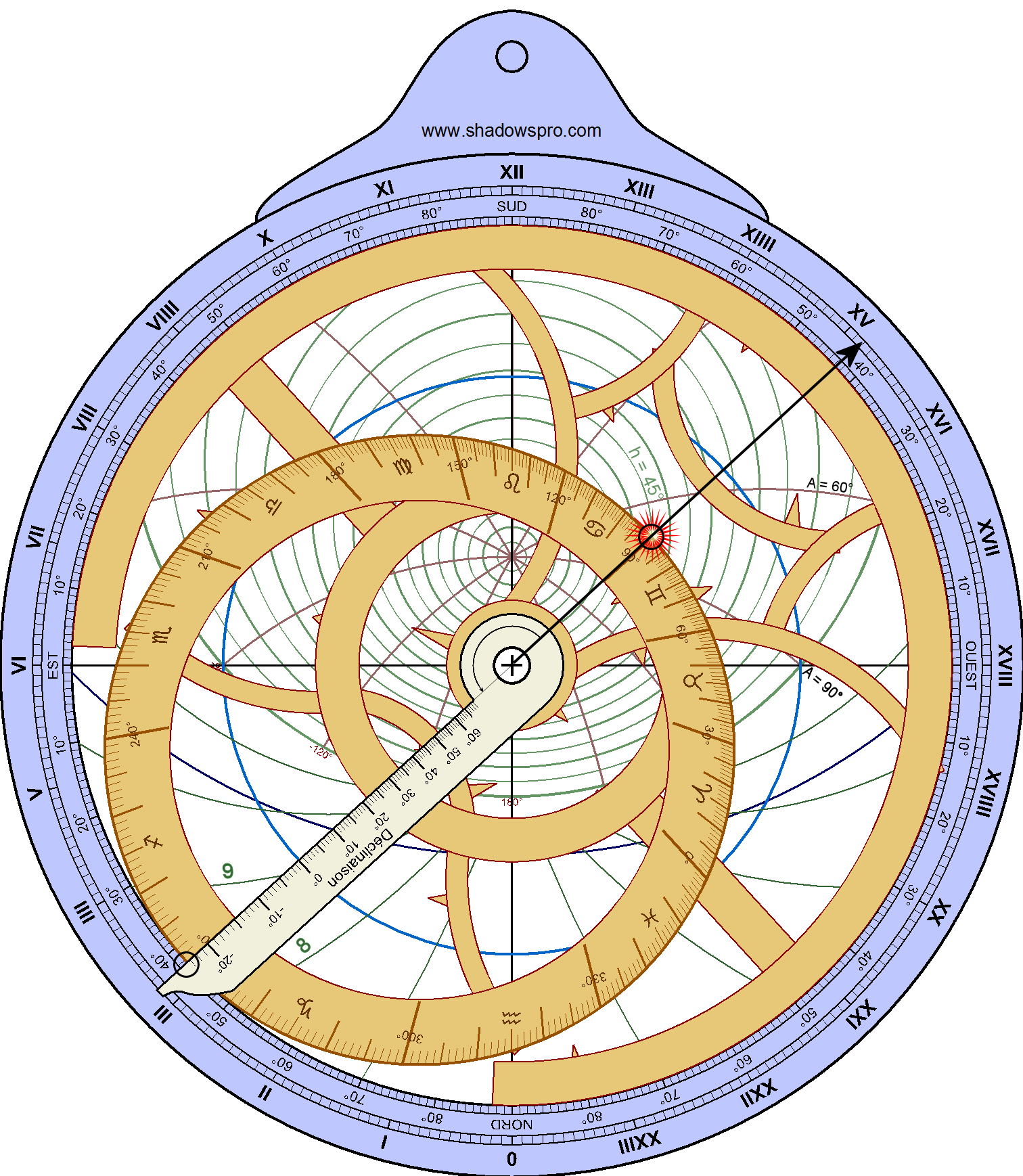 Différentes mesures effectuées à l'astrolabe (à l'aide du logiciel Shadows).